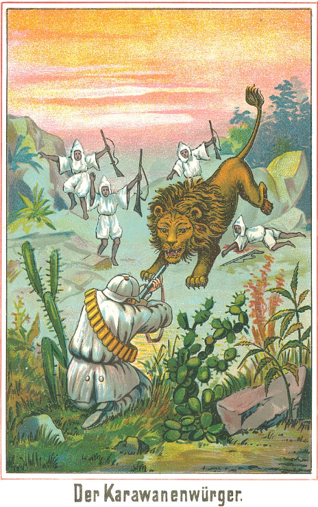 Der Karawanenwürger